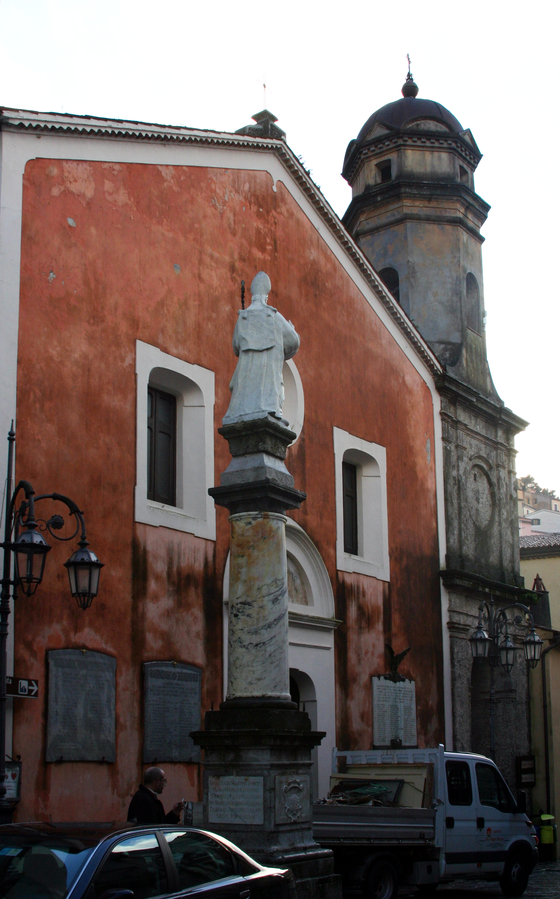 Annunziata